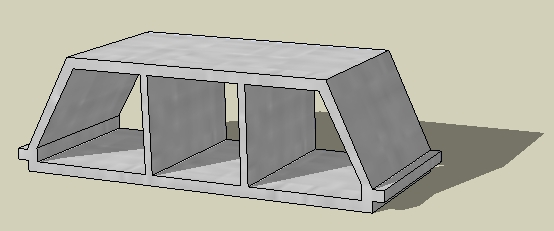 Hourdie pour plancher béton